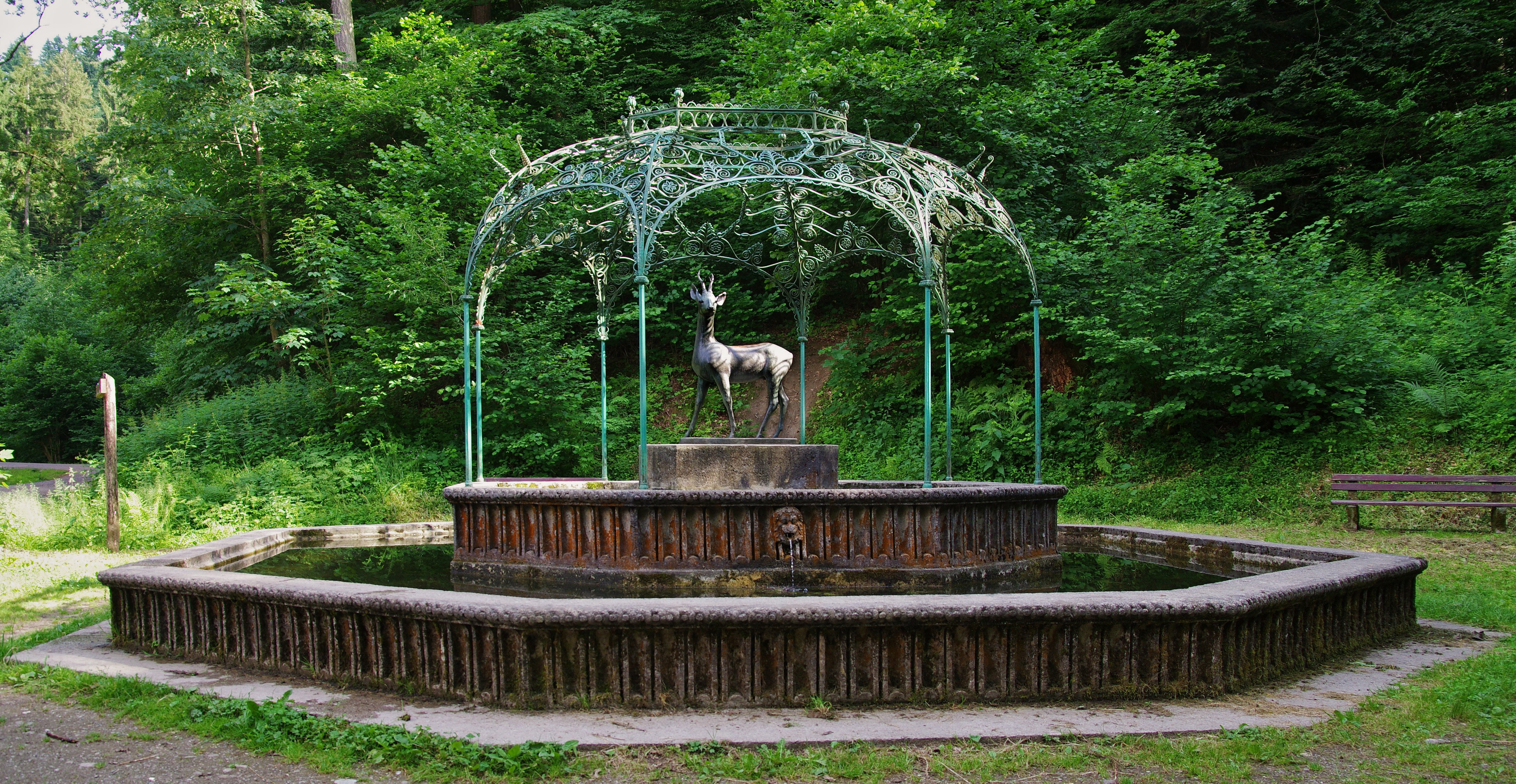 Der Rehbrunnen von Ludwig Kubanek/Brenzinger & Cie. Bodlesau, Freiburg